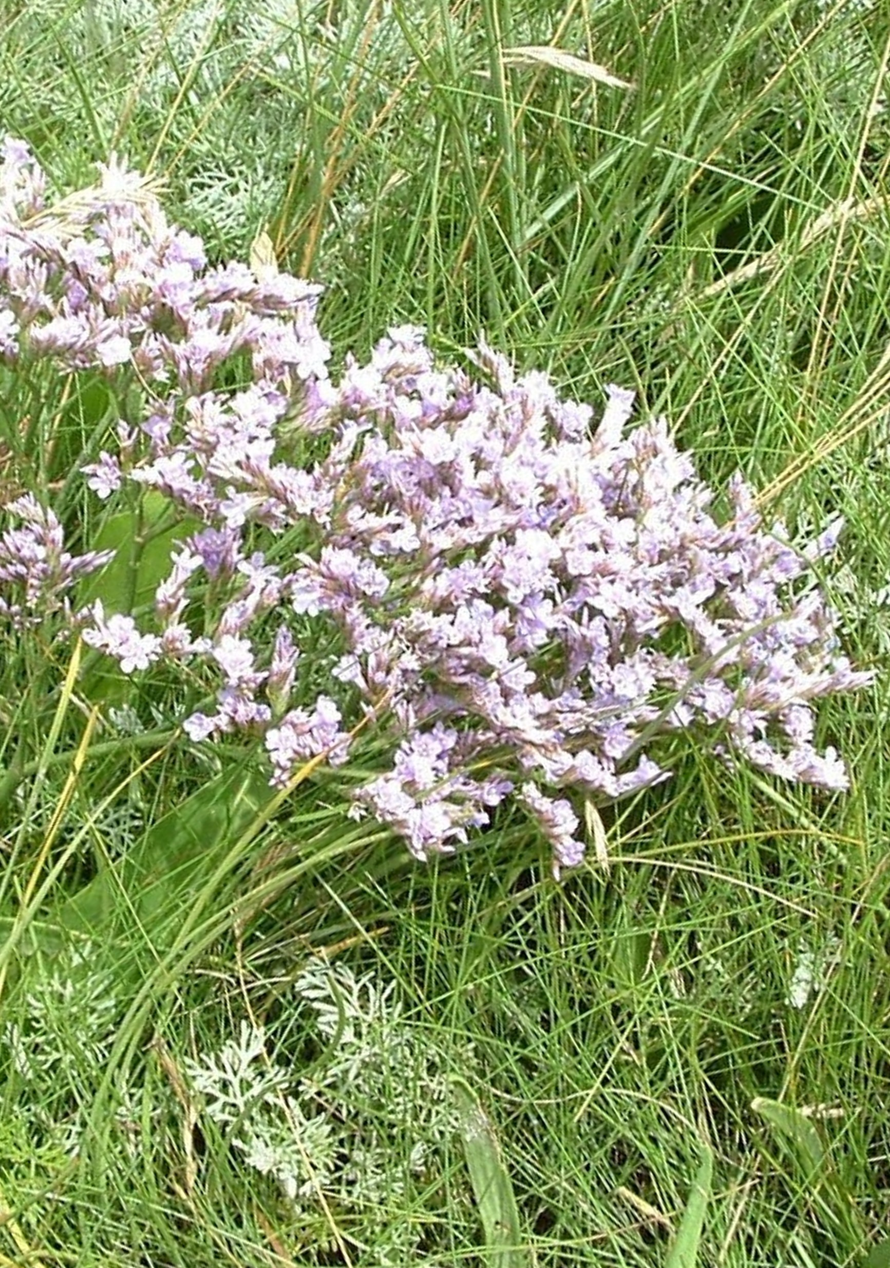 blühender Strandflieder (Limonium vulgare) in den Salzwiesen der ostfriesischen Insel Wangerooge